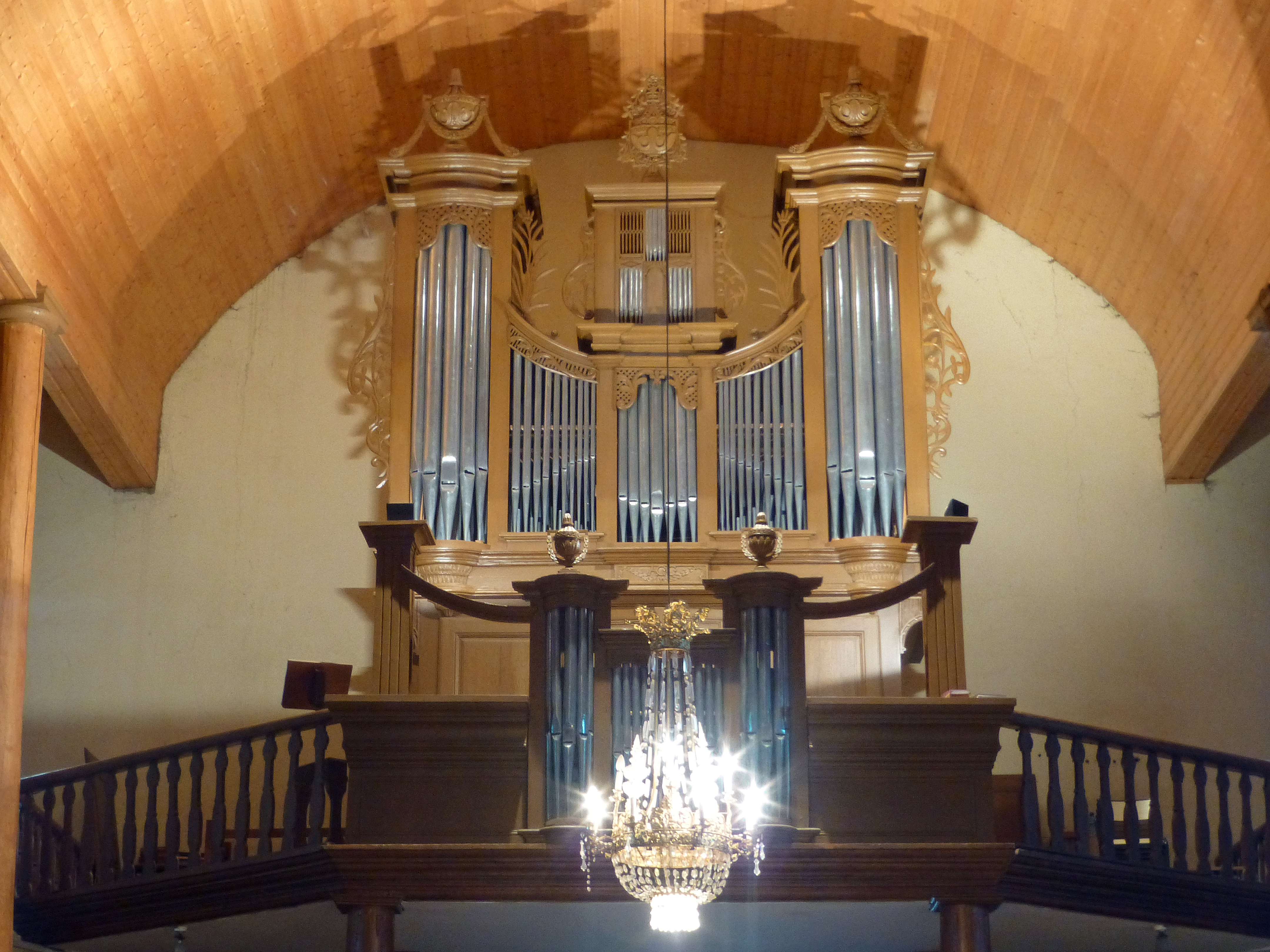 Orgue de l'église Saint-Nicolas de La Croix-aux-Mines (Vosges), construit en 1824 par Augustin Chaxel, restauré en 1994 par Laurent Plet.